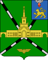 Герб города Дно, Псковская область